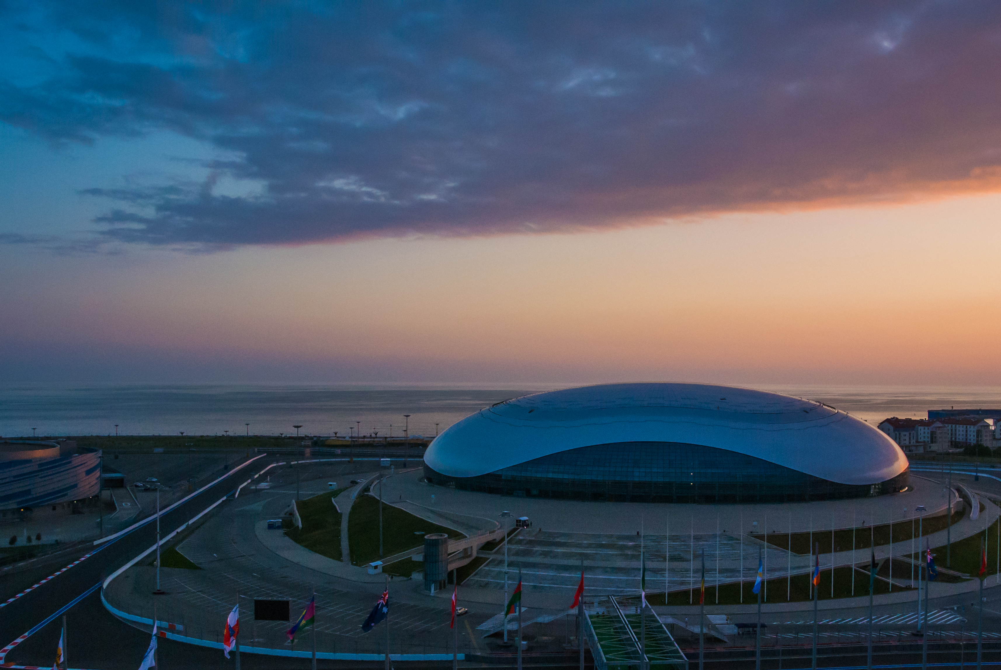 Большая Ледовая Арена